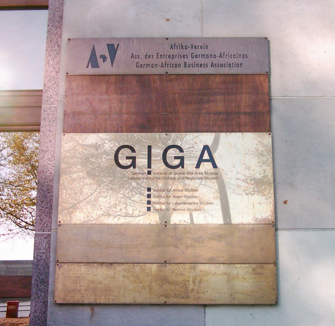 Hamburg, Neuer Jungfernstieg 21. Sitz des GIGA German Institute of Global and Area Studies, sowie des Afrika-Vereins. Siehe auch / See also Image:Hamburg Deutsche Zentralbibliothek für Wirtschaftswissenschaften 01.jpg Image:Hamburg Deutsche Zentralbibliothek für Wirtschaftswissenschaften 02.jpg Image:Hamburg, Neuer Jungfernstieg 21 03.jpg